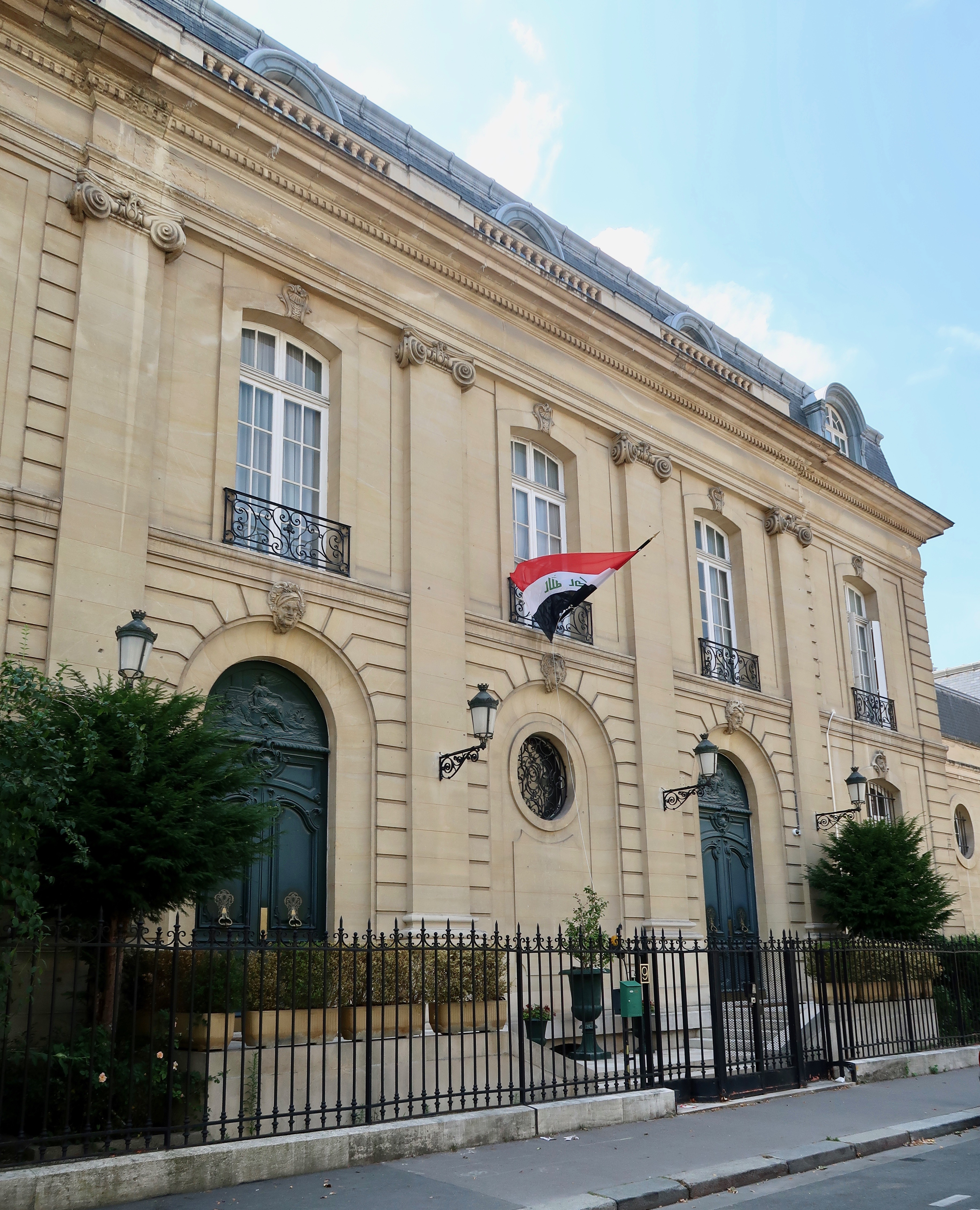 Résidence de l'ambassadeur d'Irak à Paris, 9 rue d'Andigné (Paris, 16e).